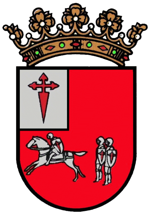 Escudo de Villafranca de los Barros (Badajoz)